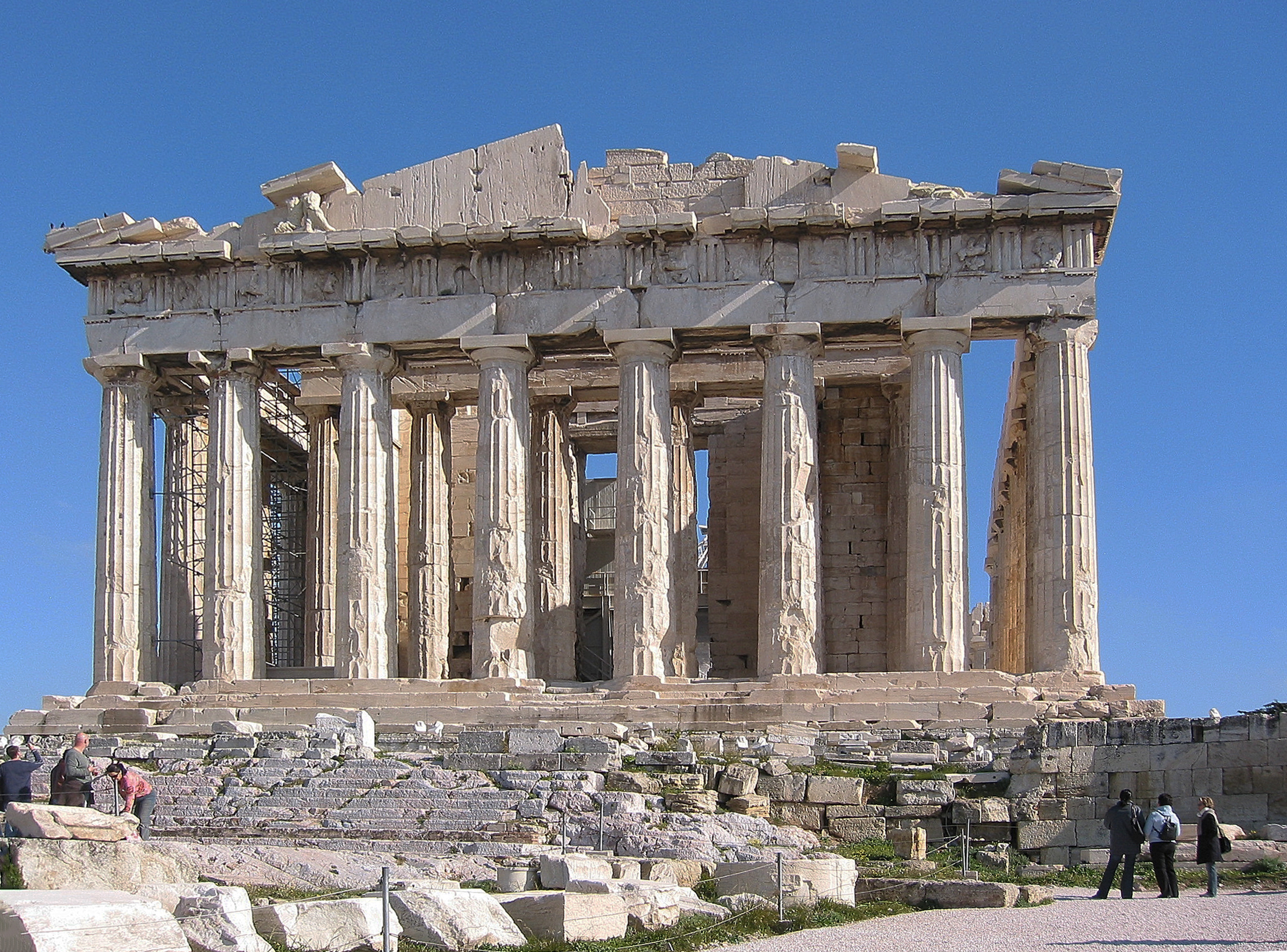 Athènes Parthénon